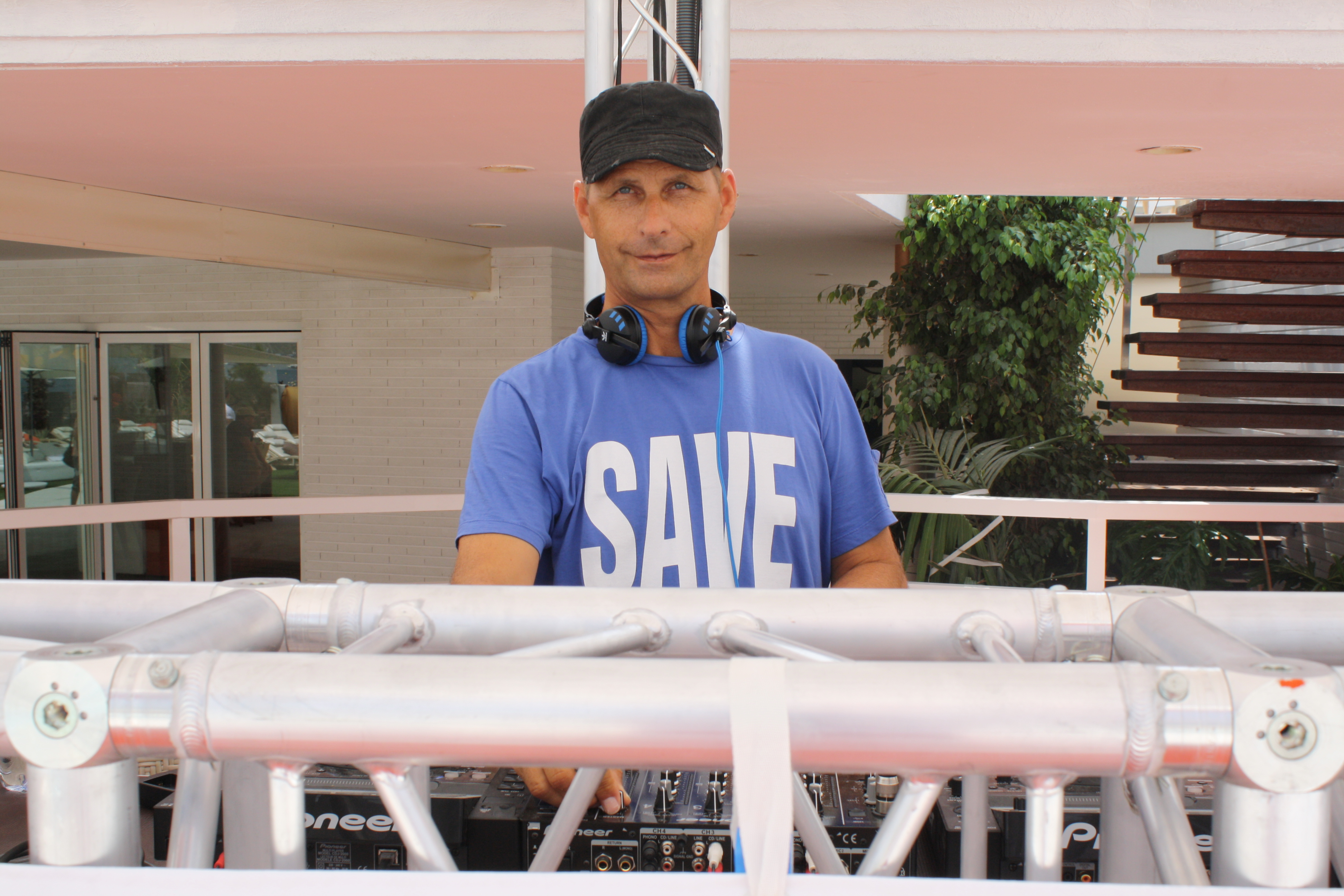 El dj Lorenzo al Dino en Ocean Beach Club Ibiza. Verano 2012